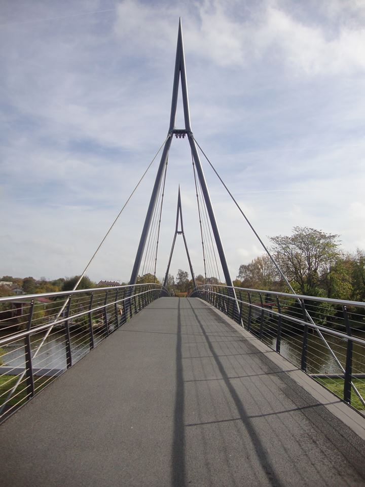 Bridge